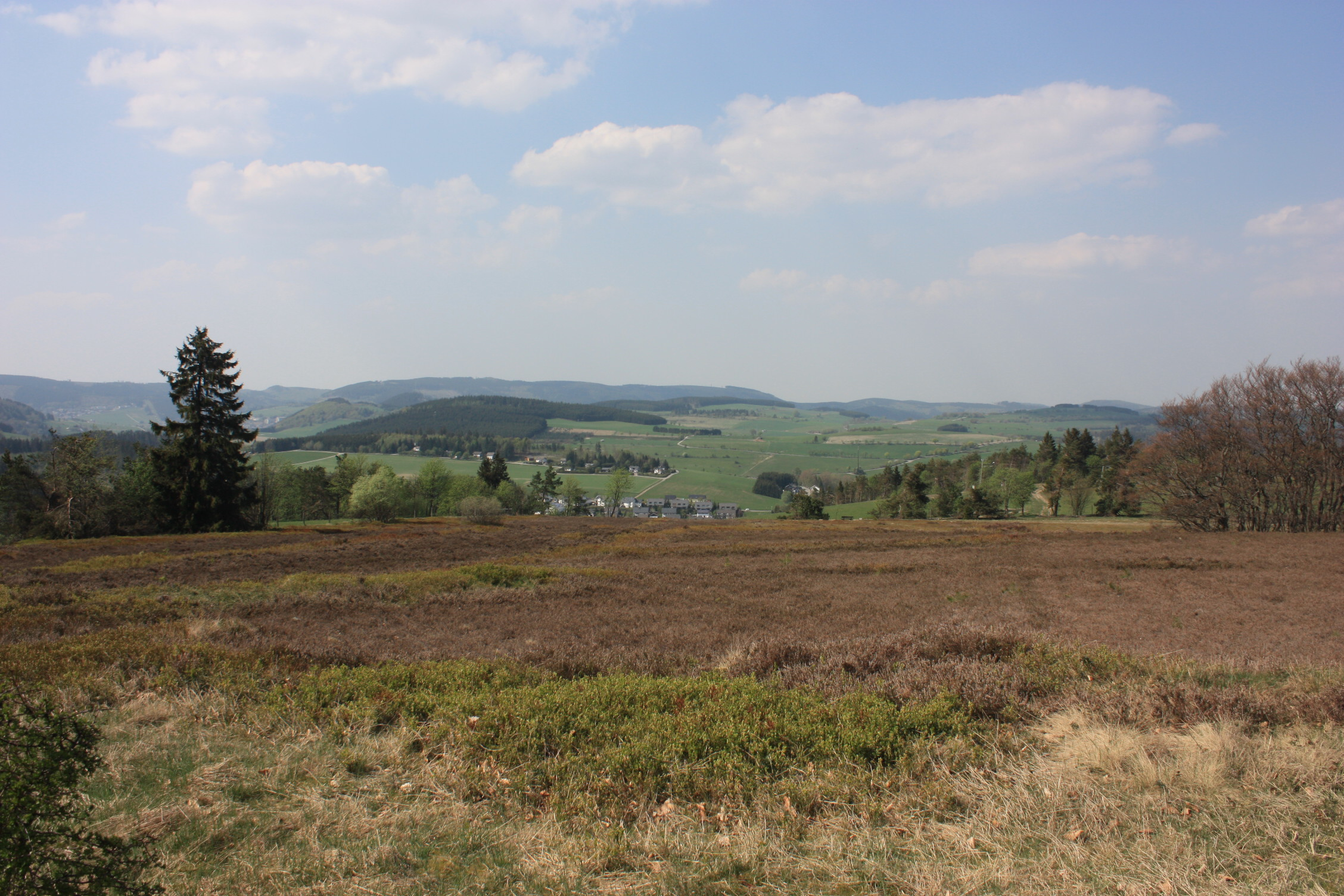 Blick von der nördlichen Kuppe des Kahlen Pön in nordwestliche Richtung über Teile von Usseln, zum Schneeberg (etwas links der Mitte), dahinter links der Höhenzug Dreis mit Hohem Eimberg, und zum Osterkopf (rechts); die Heidefläche im Vordergrund liegt im hessischen Naturschutzgebiet „Kahle Pön bei Usseln“